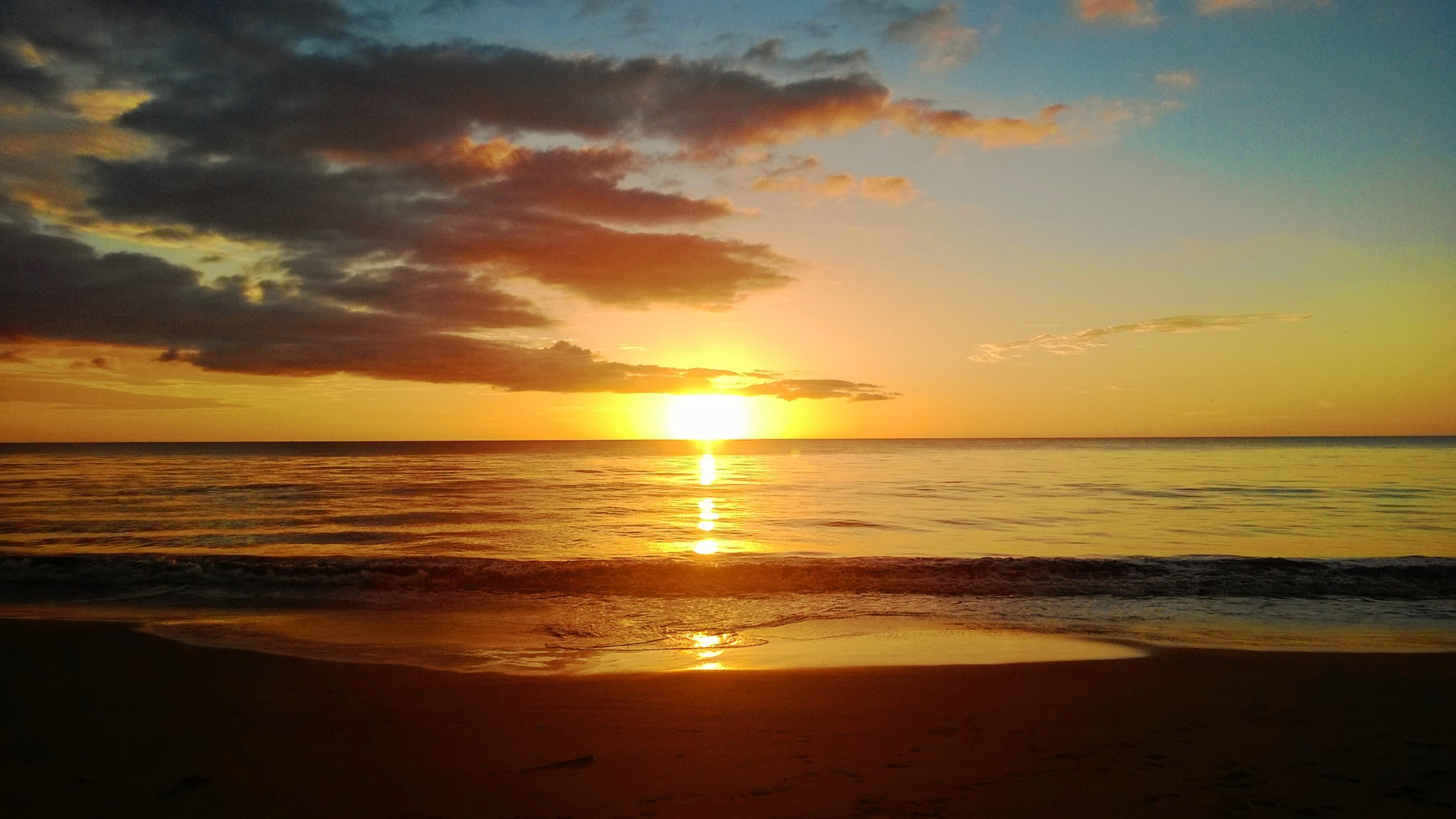 Playa El Maní, Mayagüez, Puerto Rico (2013)